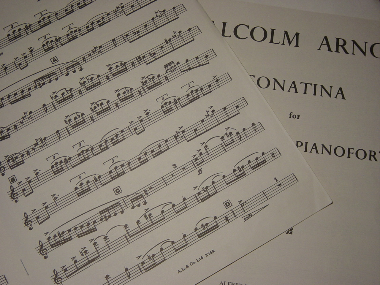 Imagen de la Sonatina para Clarinete y Piano, op. 29 de Malcolm Arnold, editada por Alfred Lengnick & Co.